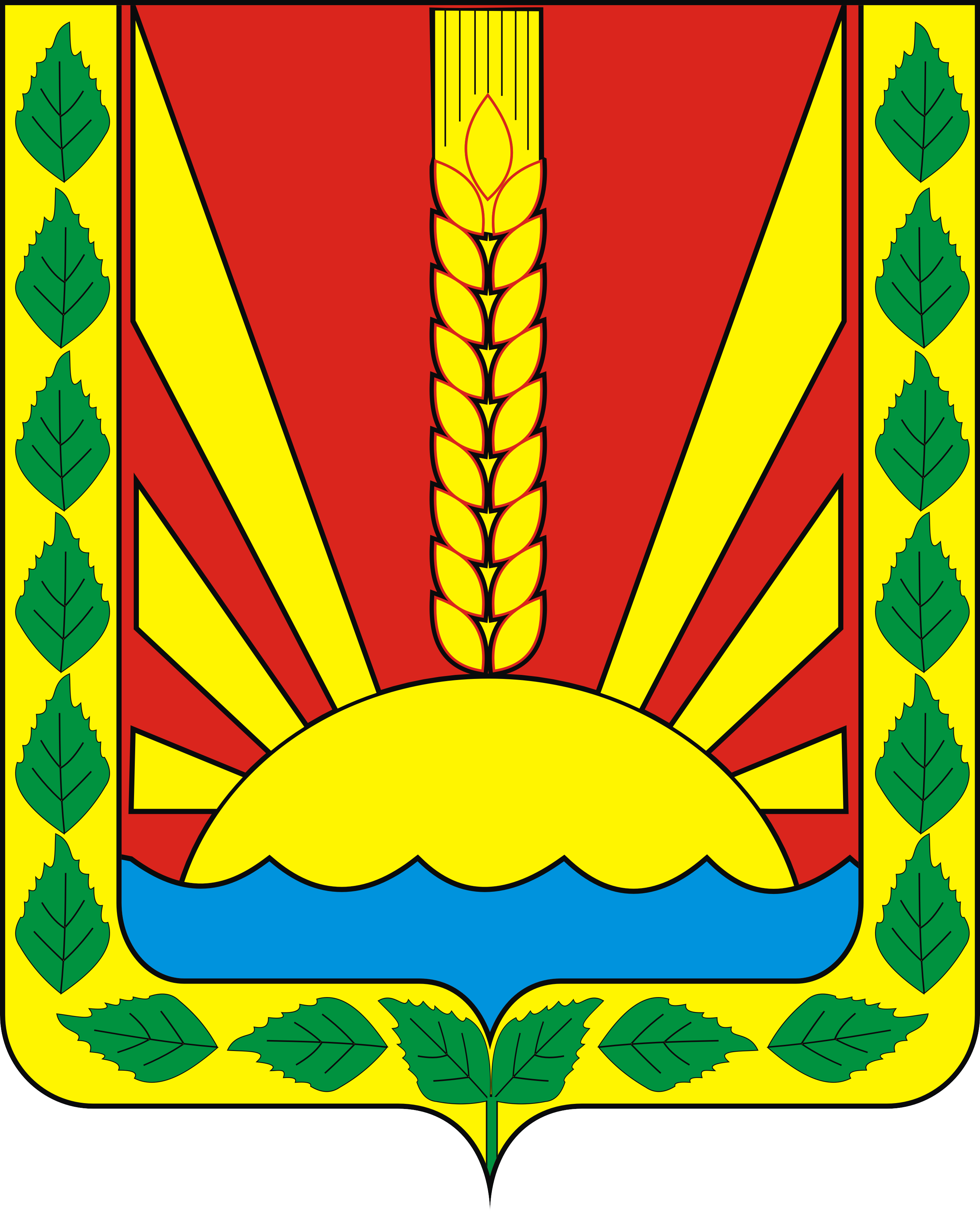 Герб Шенталинского района Самарской области